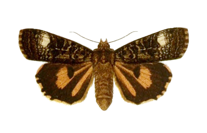 Triphaena [sic] efflorescens Btlr. = Xestia efflorescens (Butler, 1879)